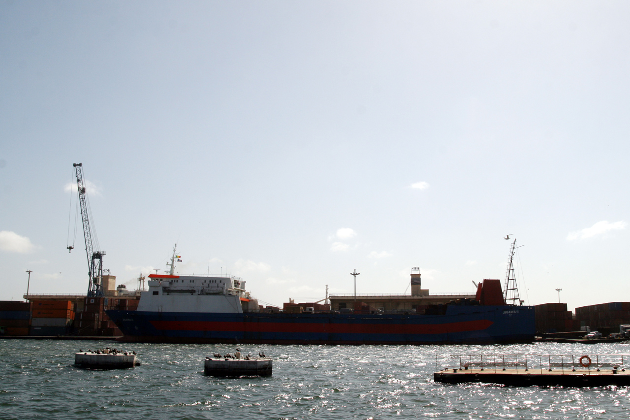 Jigawa II dans le port de Dakar